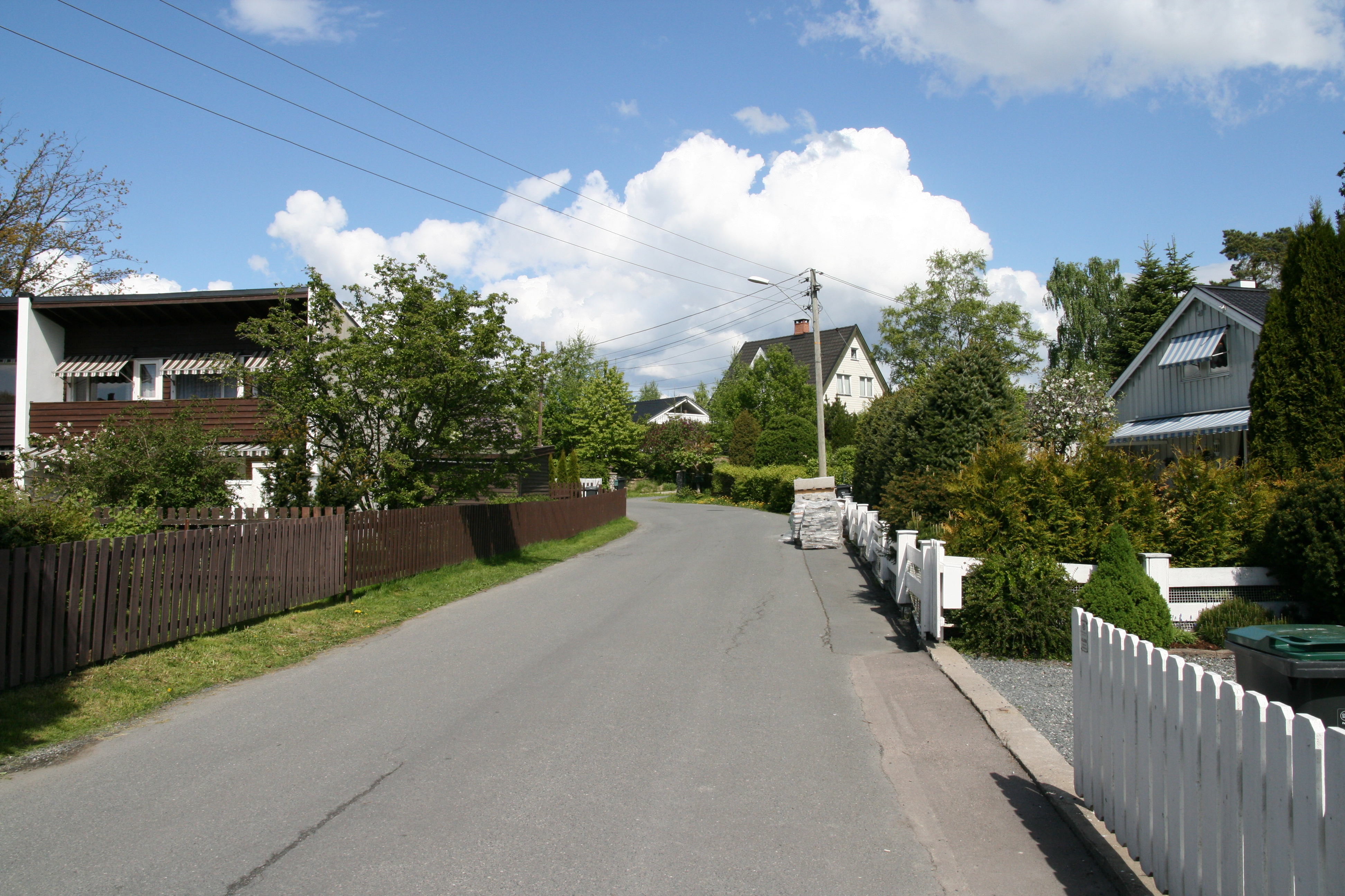 Østbyfaret. Ulsrud i Oslo